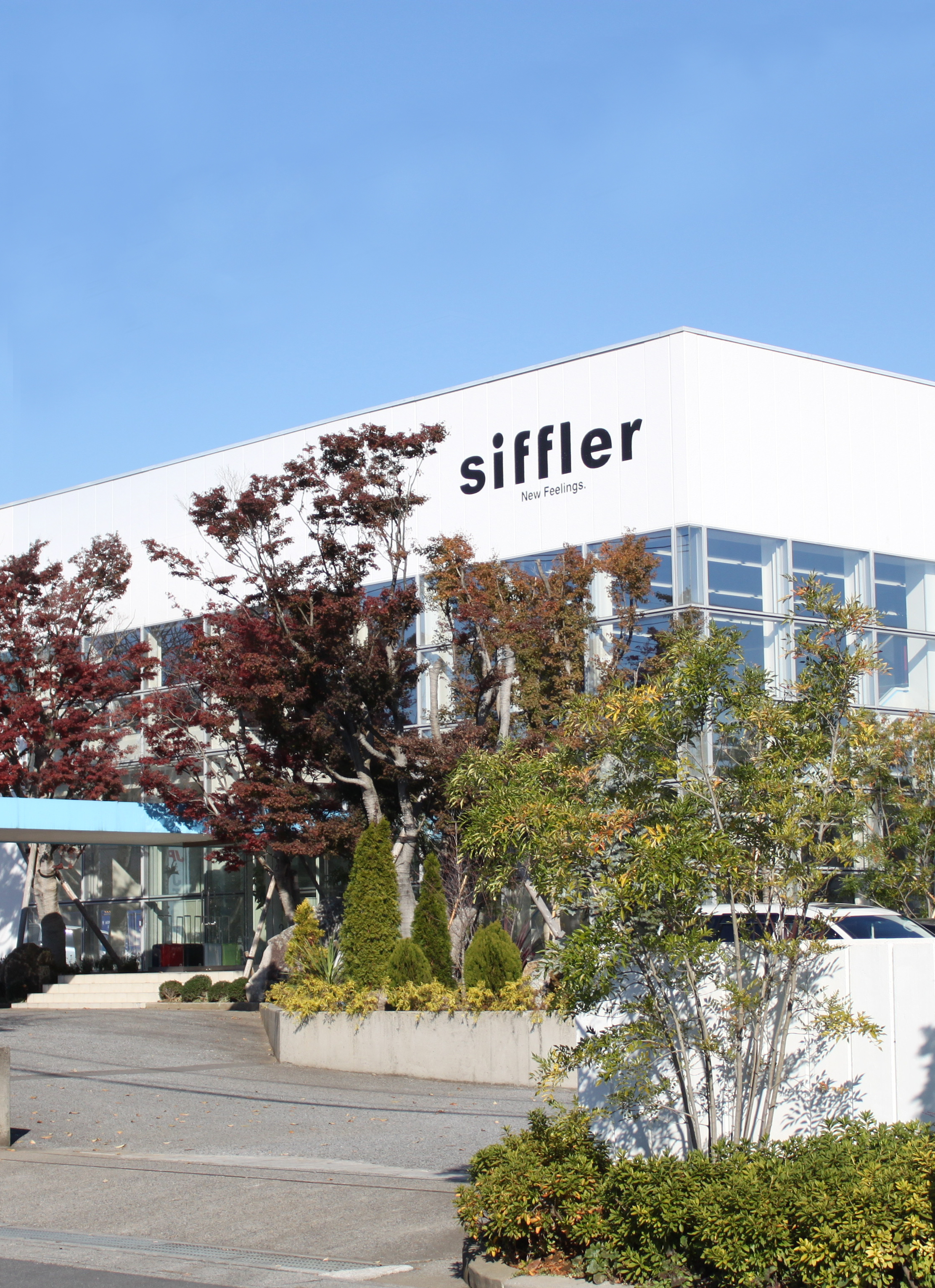 シフレ本社